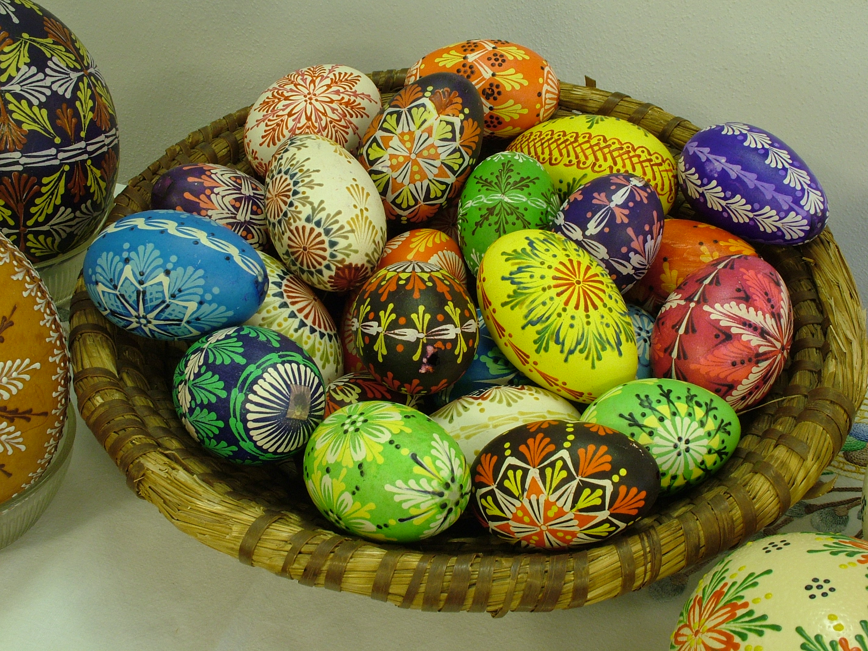 Česká velikonoční vajíčka, Trhový Štěpánov, region Český Smaragd